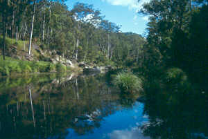 Carnarvon Gorge